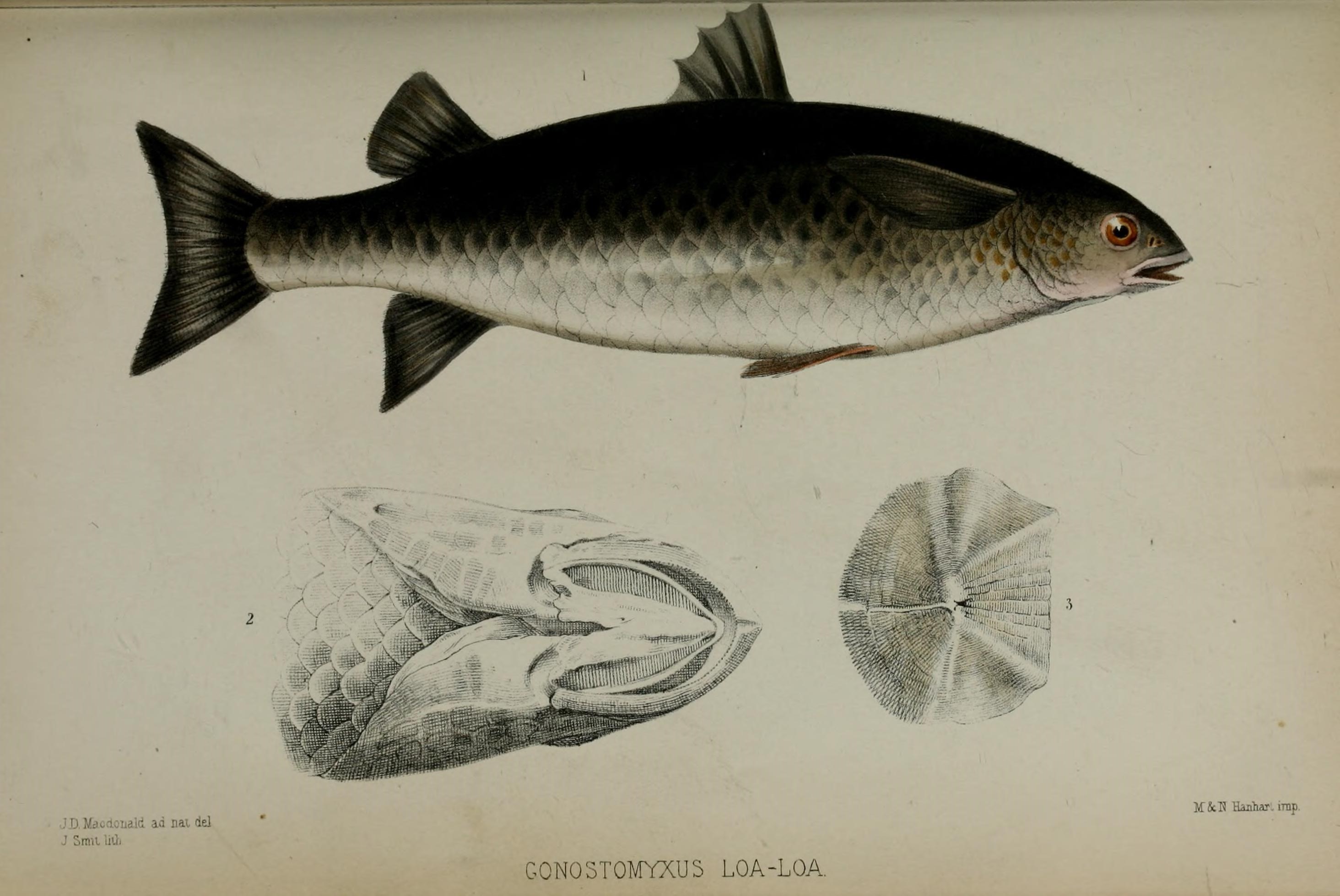 Cestraeus plicatilis syn. Gonostomyxus loa-loa